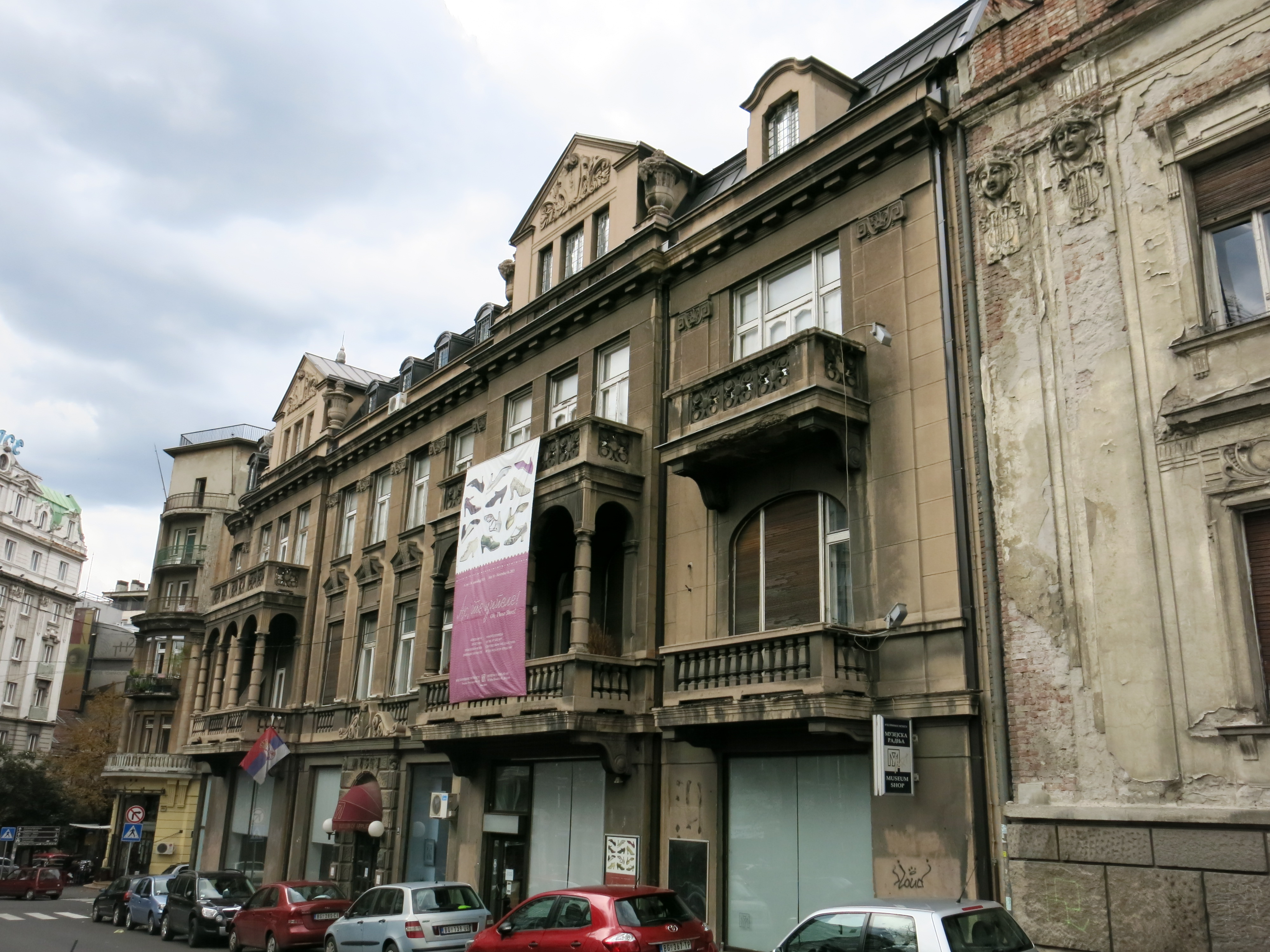 Зграда Јакова Челебоновића